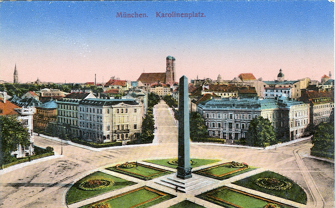 Postkarte, undatiert ( ca.1914 ). Beschriftung: "München - Karolinenplatz".